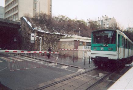 Passage à niveau rue de Lagny à Paris, dans le 20e arrondissement, pour le passage des métros vers les ateliers de réparations